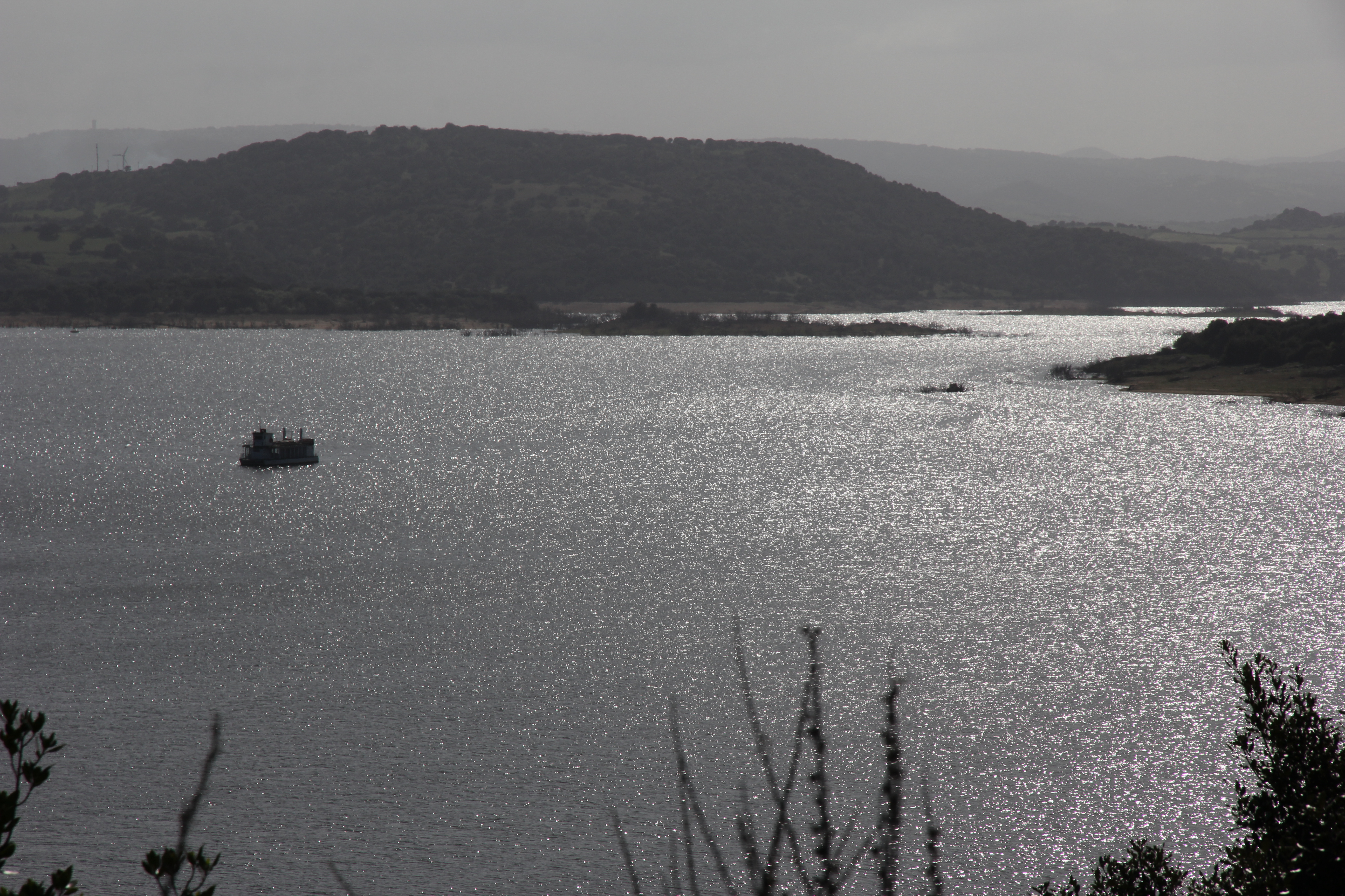 Luras - Lago Liscia